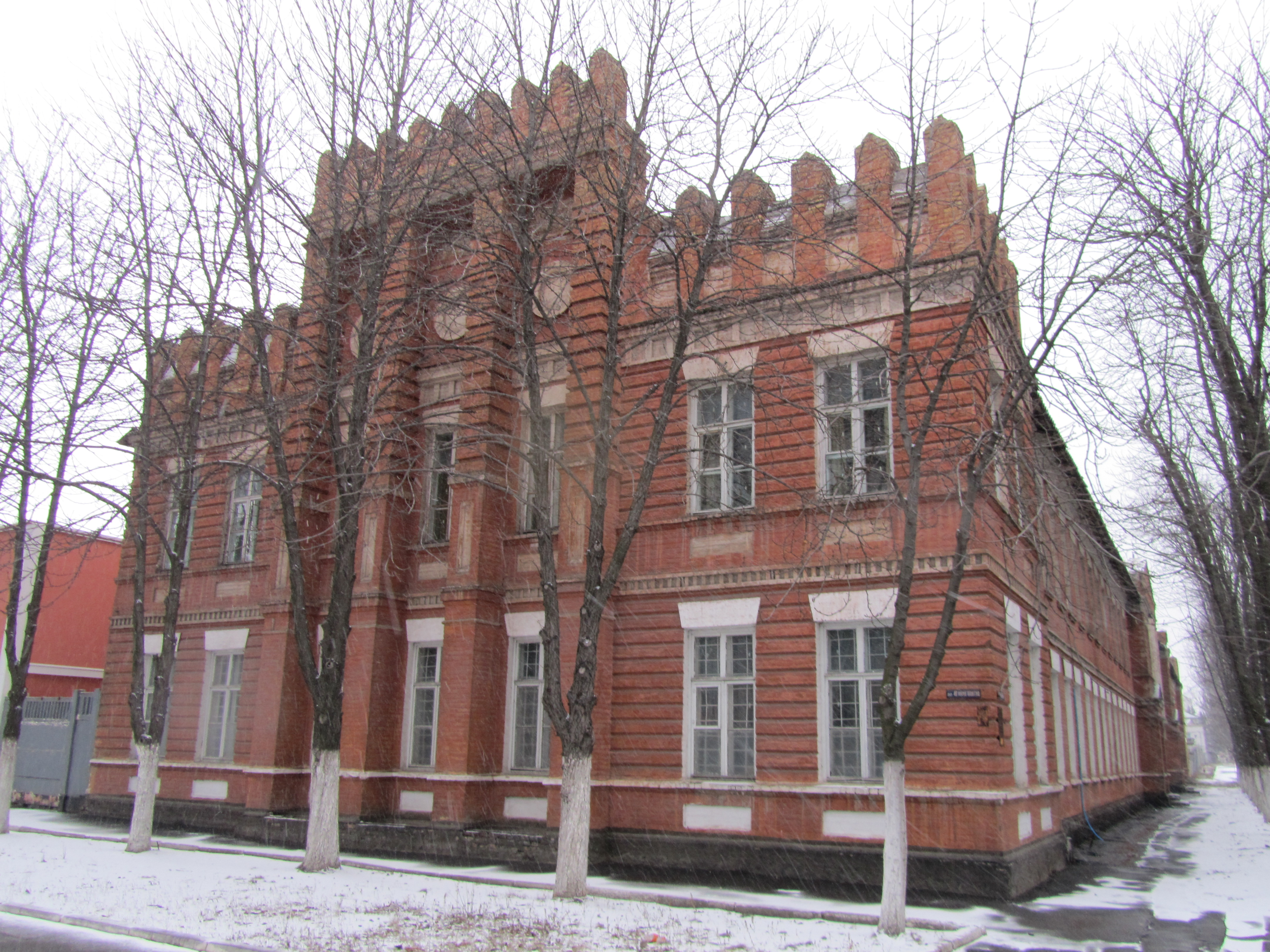 Казарми 35-го Брянського піхотного полку у Кременчуці. Зараз будівля знаходиться на перехресті вулиць 40 років Жовтня та Чапаєва